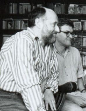 Fodor Géza magyar dramaturg, esztéta, egyetemi docens.